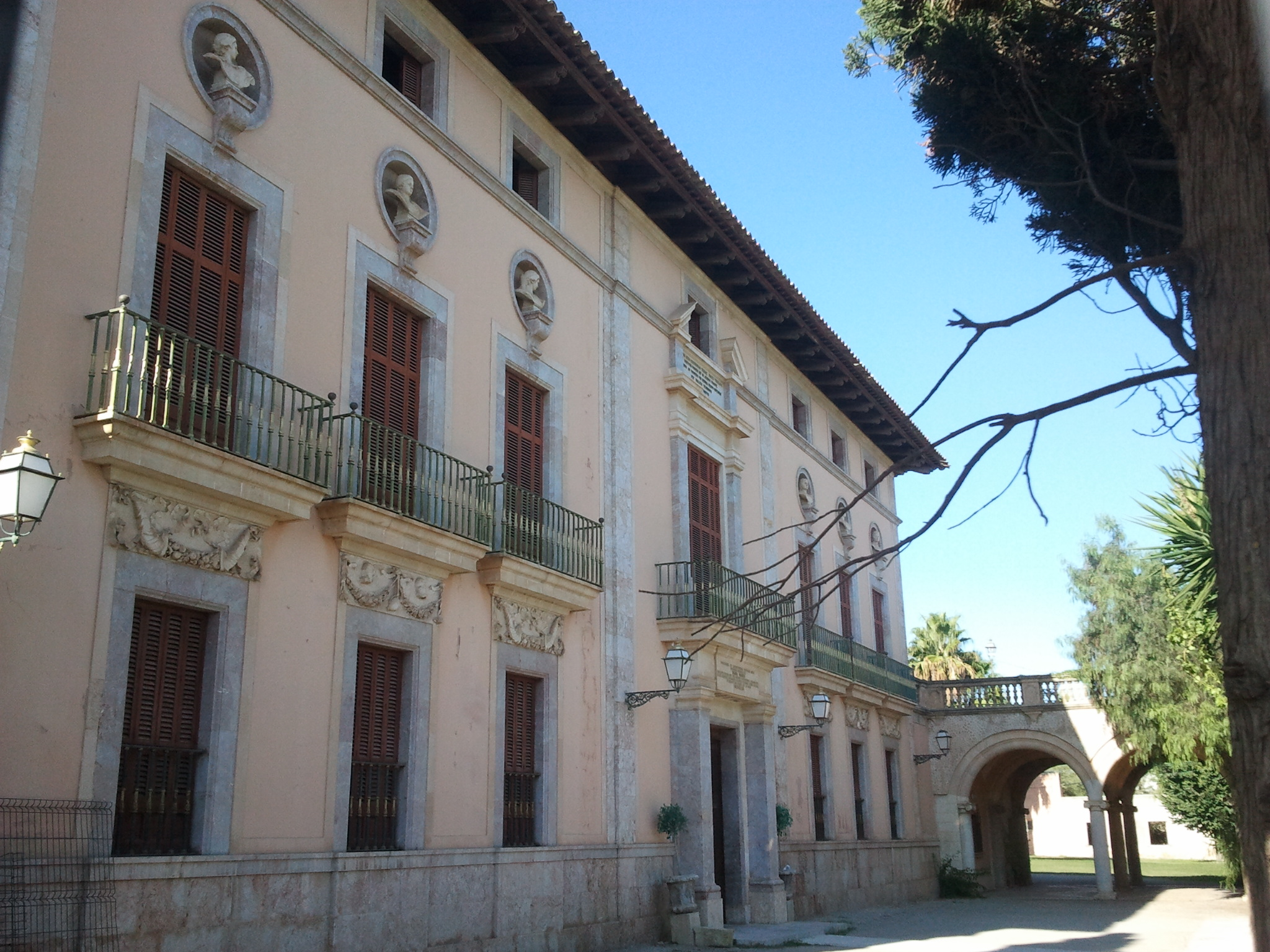 Palau i jardins d'Ayamans (Lloseta)